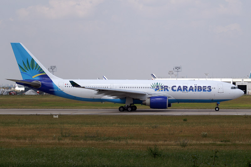 Air Caraïbes Airbus A330-200 F-OFDF